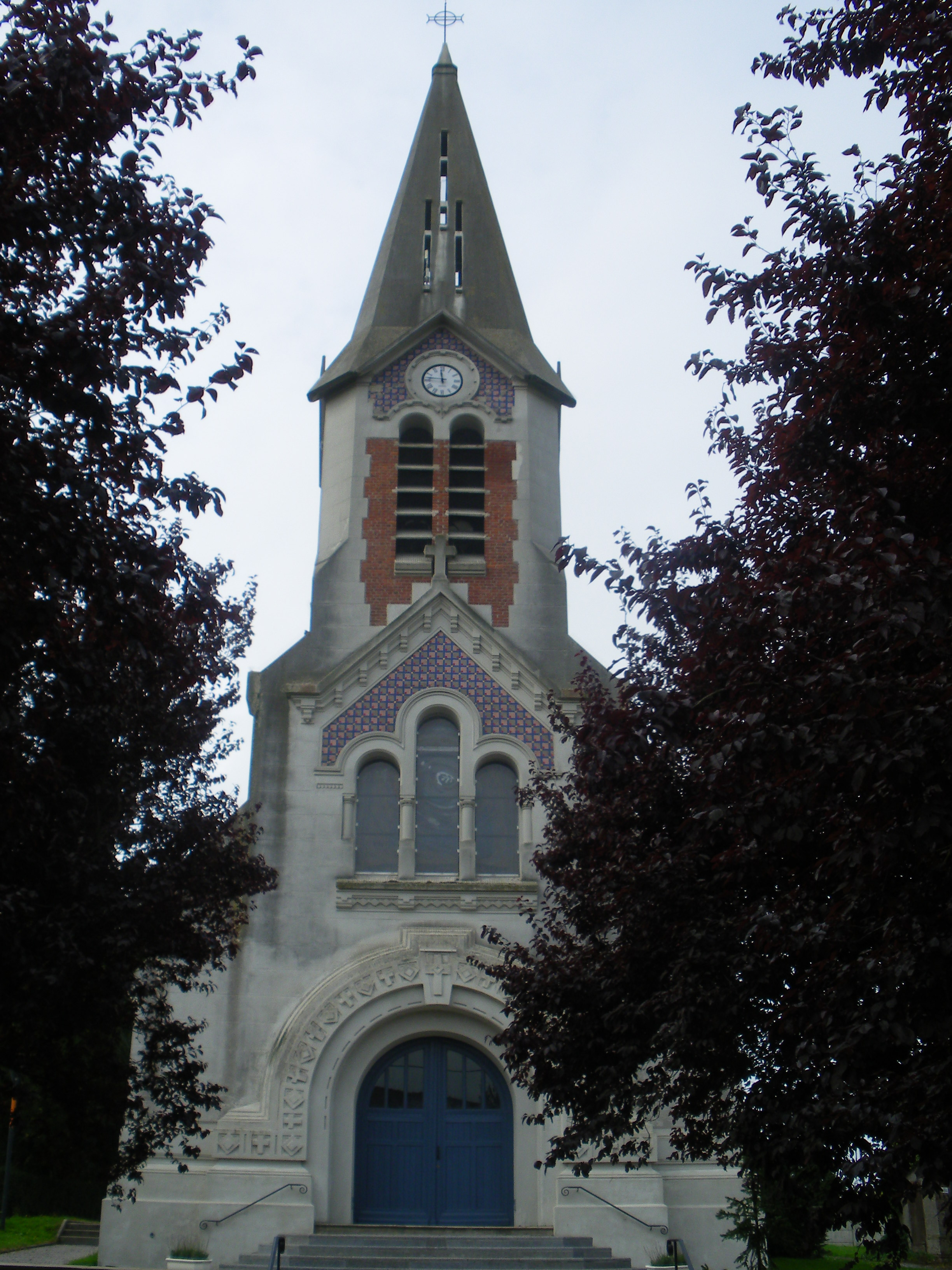 Vue de l'église Saint-Martin d'Acheville.